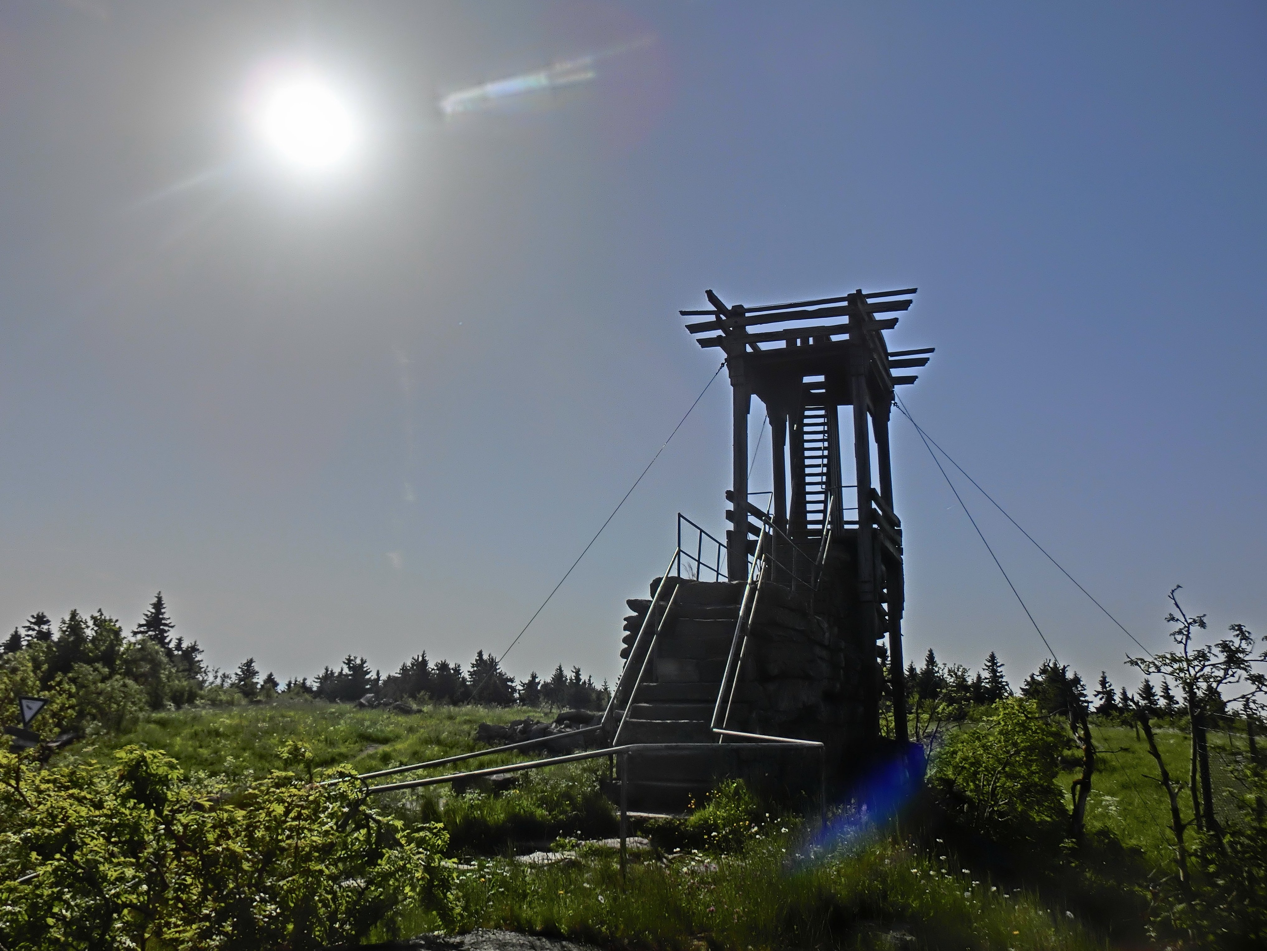 Backöfele 1